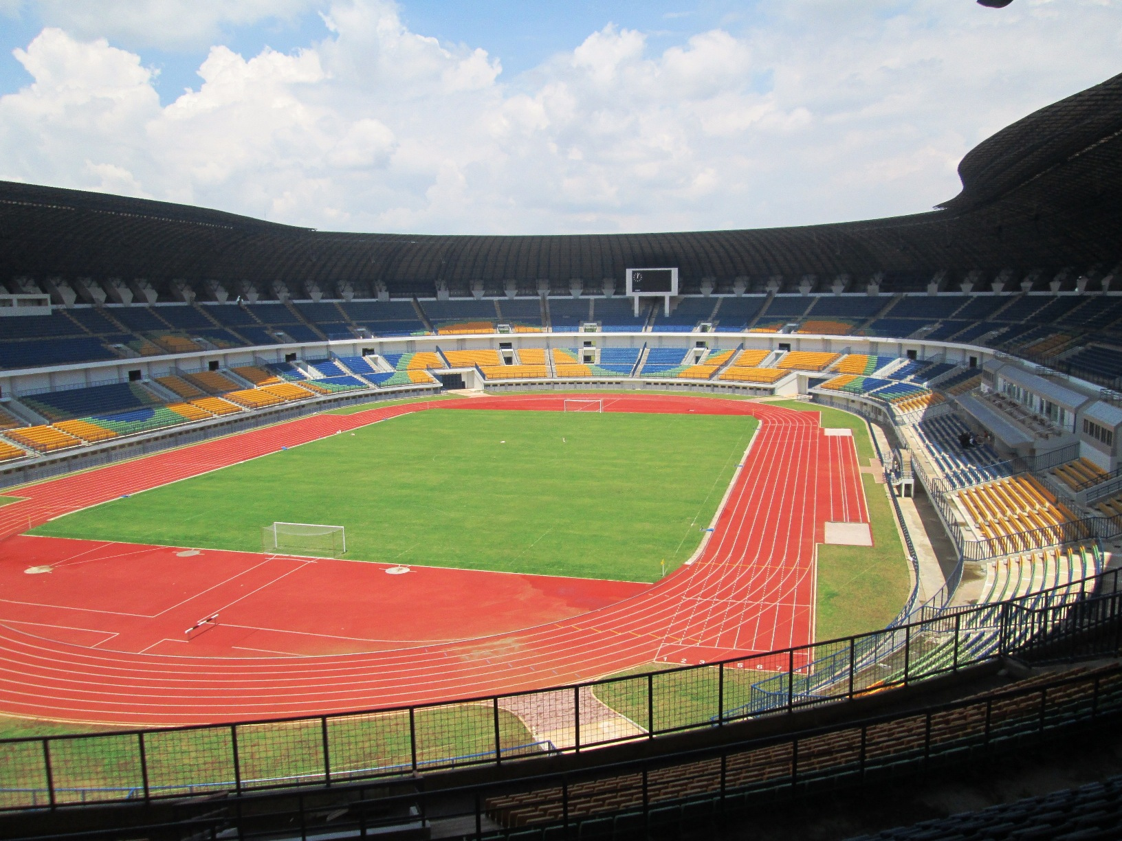 Foto dari tribun utara